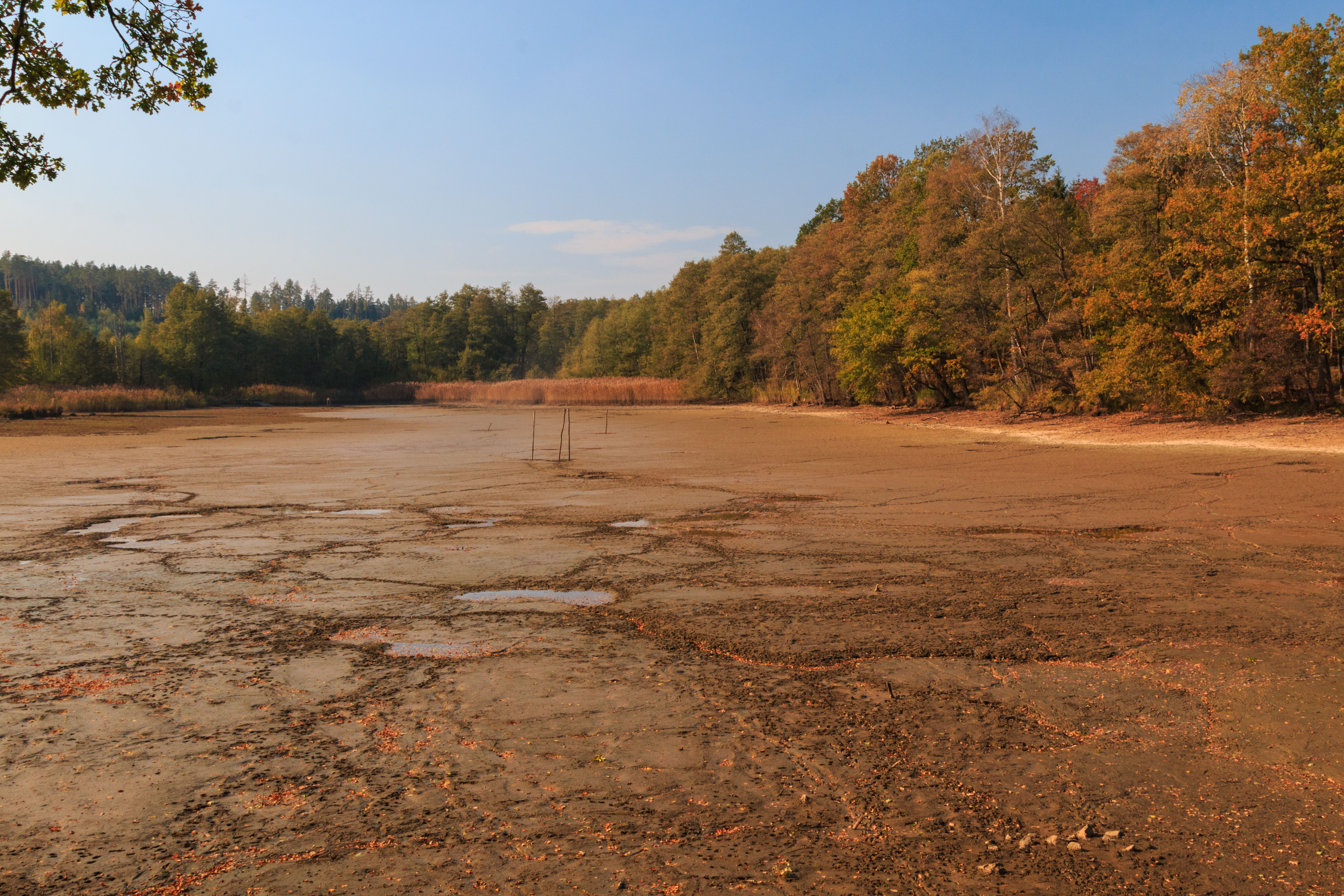 Hluboký rybník u Kochánovic Project: Vodstvo. Ticket: 1618.